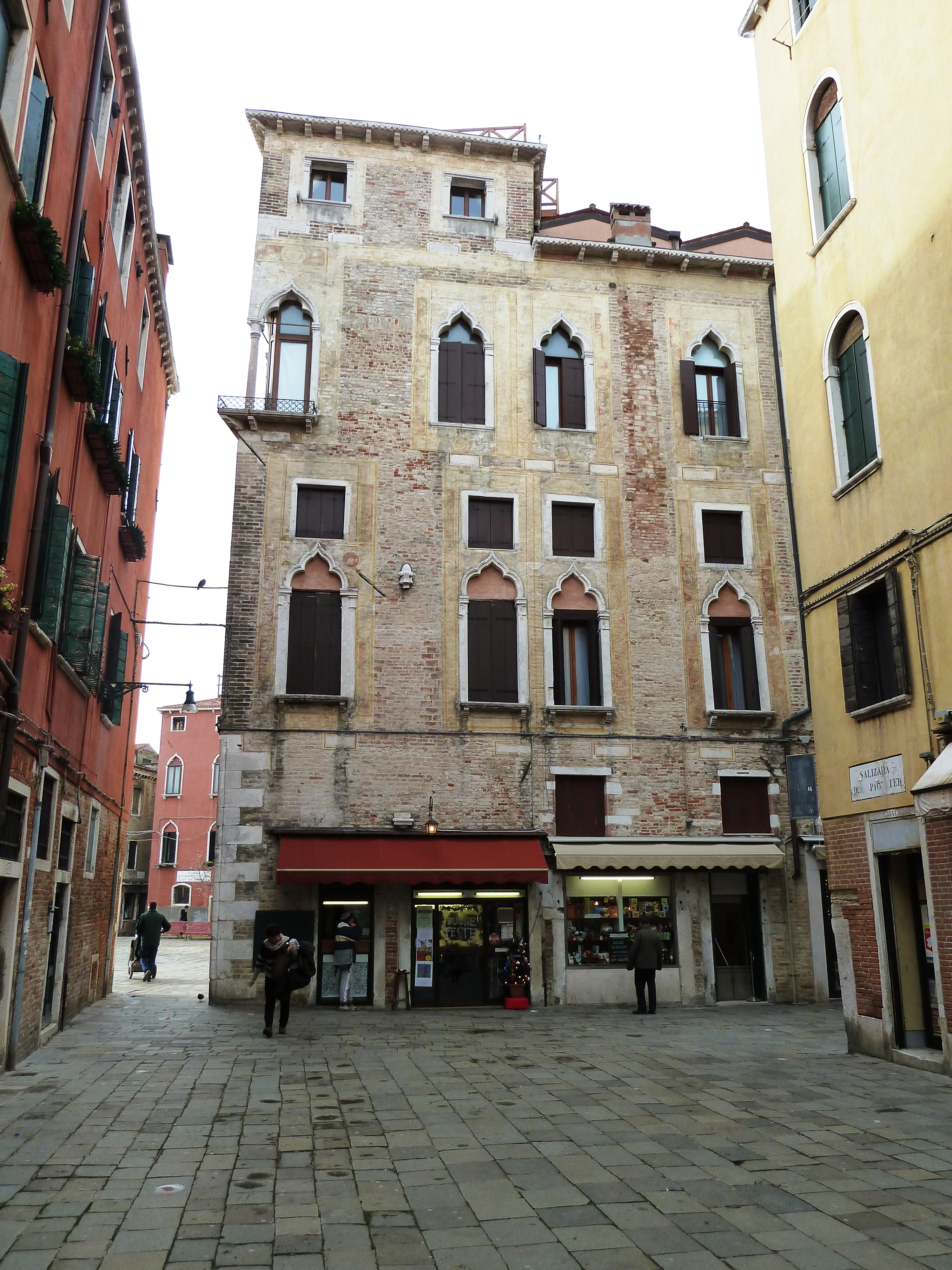 Palazzo Gritti Morosini Badoer (Venice)